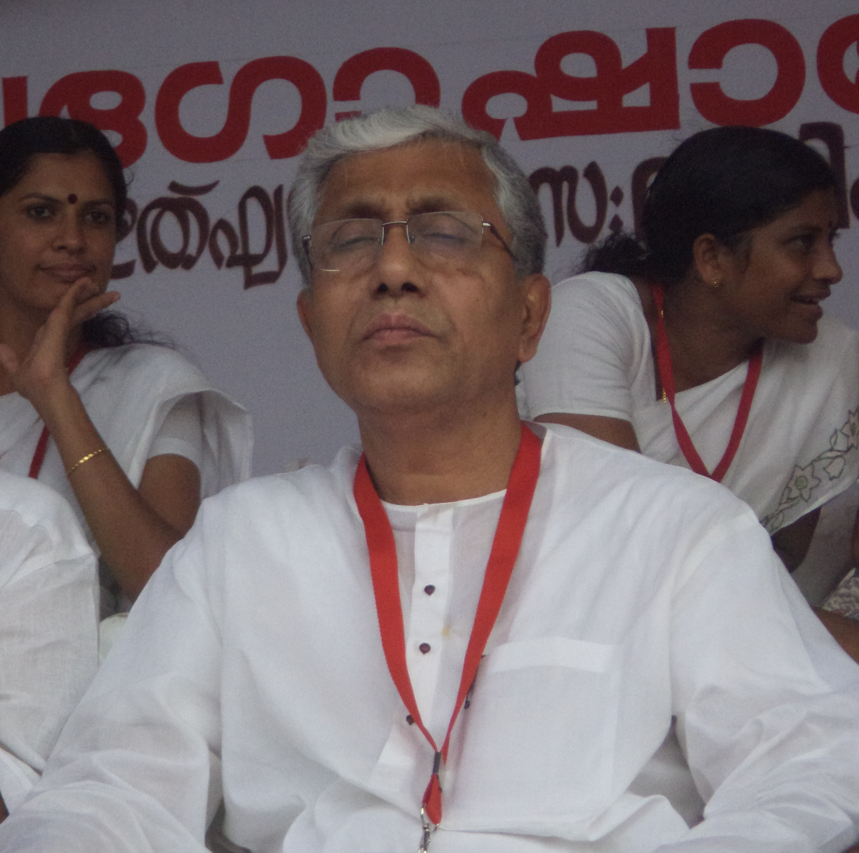 മണിക് സര്‍ക്കാര്‍ 2013 ലെ ഡി.വൈ.എഫ്.ഐ കേരള സംസ്ഥാന സമ്മേളന റാലിയില്‍